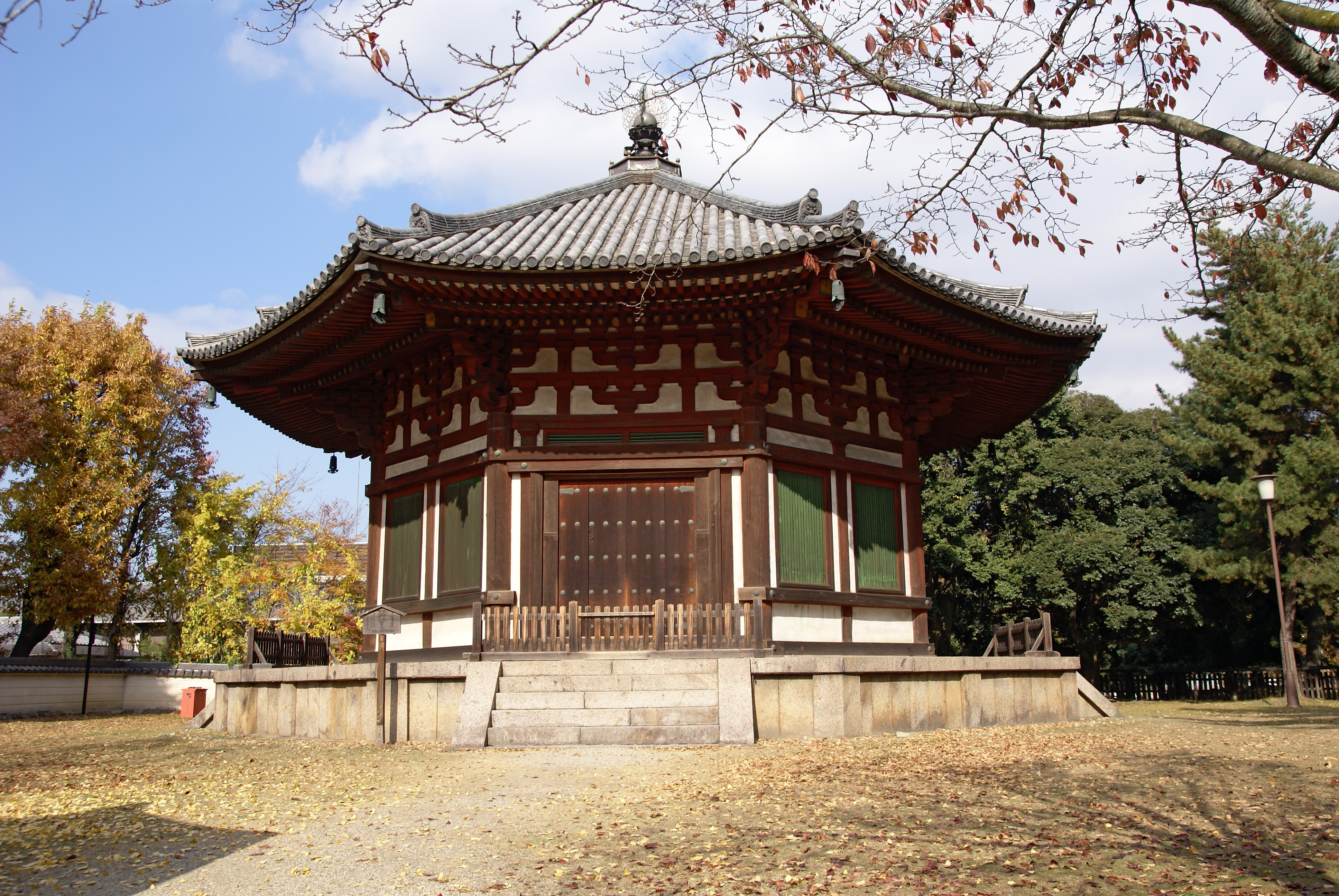 Kofukuji in Nara, Nara prefecture, Japan